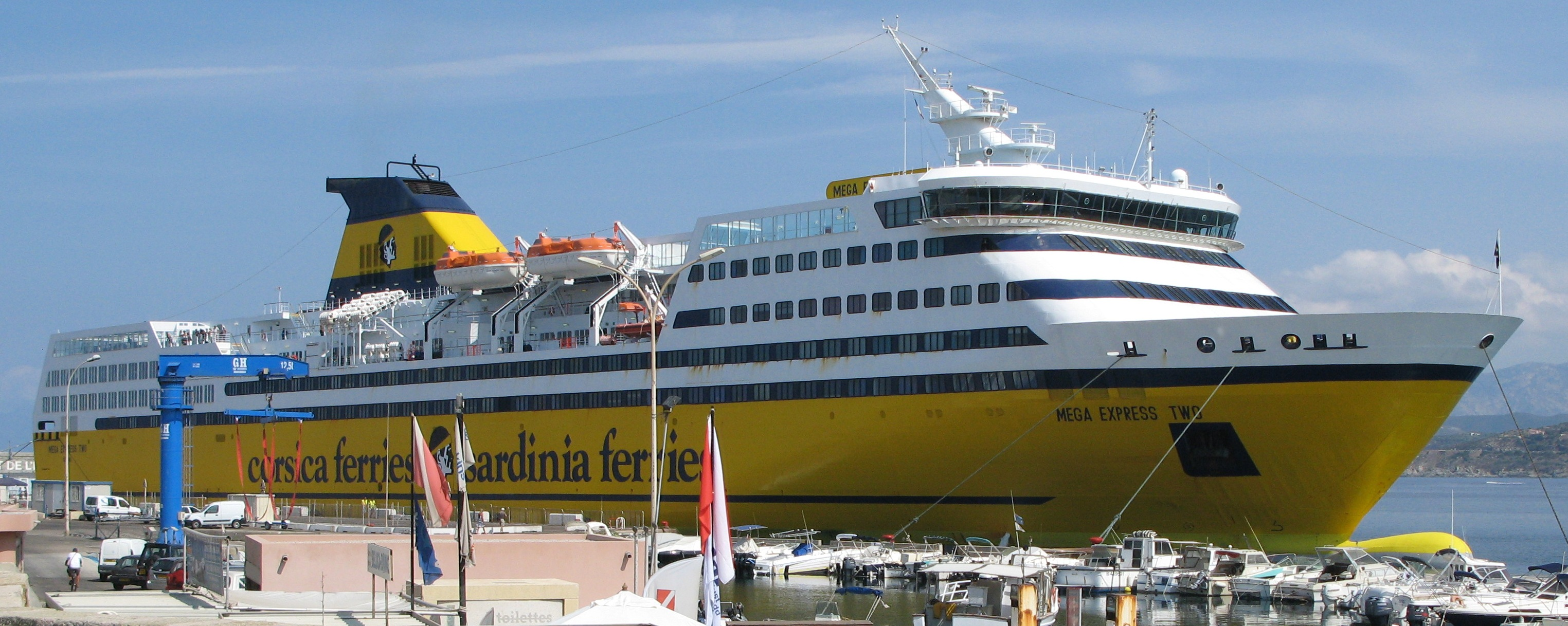 Mega Express Two dans le port de l'Île Rousse